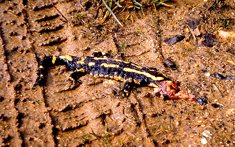 Salamandre écrasée par une voiture (roadkill), Réserve naturelle d'Heuringhem, plateau d'helfaut, Nord de la France